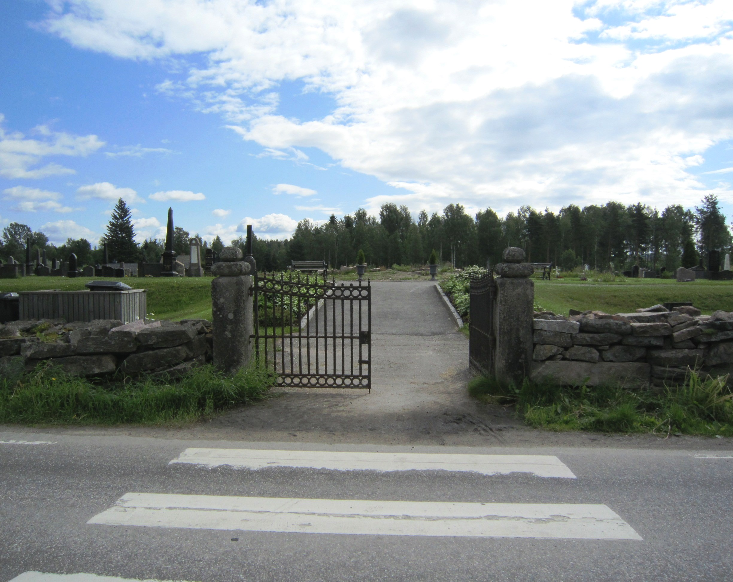 Fylkesvei 508 går forbi der Våler kirke stod inntil 2009.